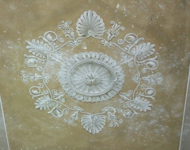 Particolare degli affreschi sopravvissuti ai restauri degli anni '30. - Liceo classico Pietro Verri